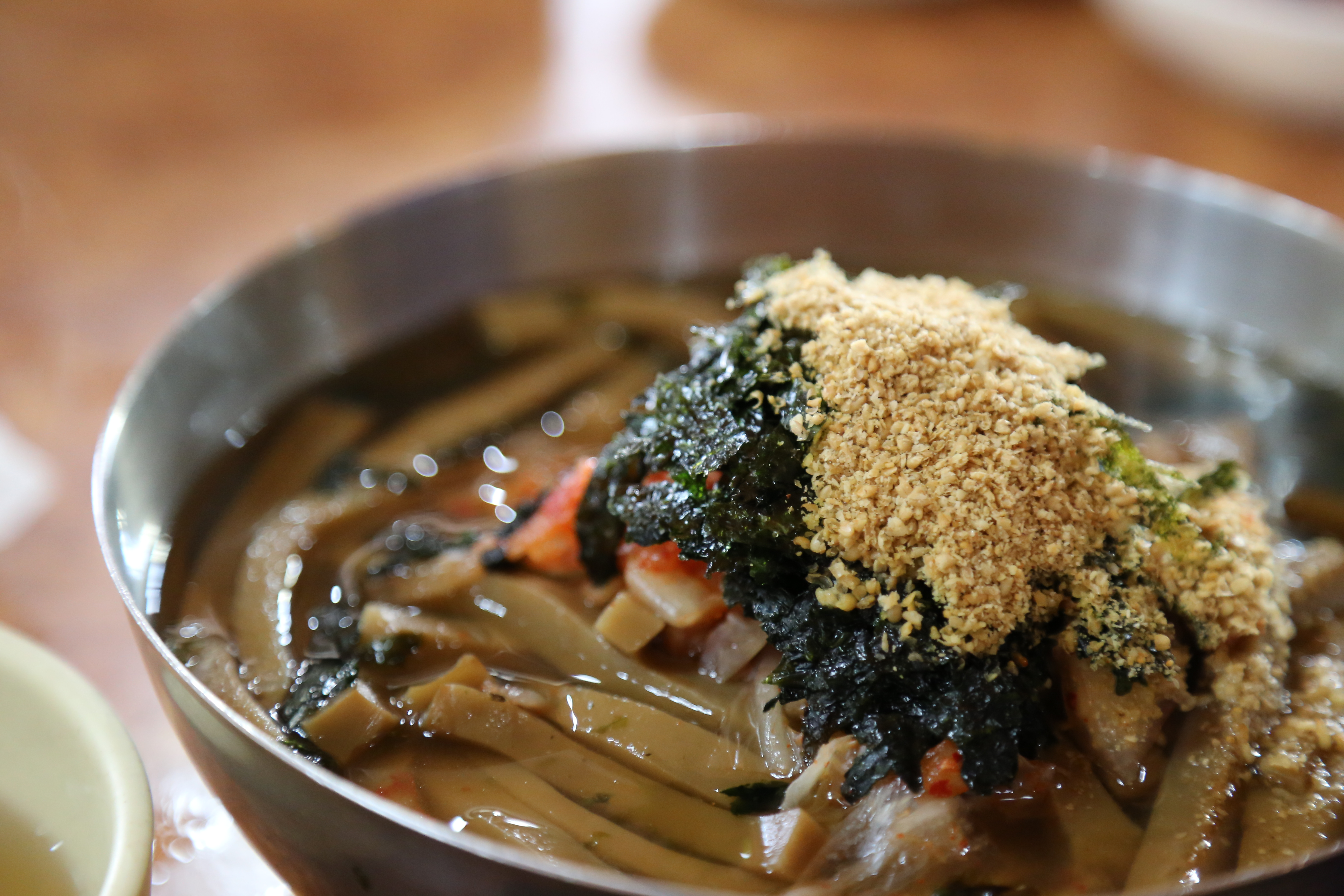 대전 구즉 도토리 묵밥